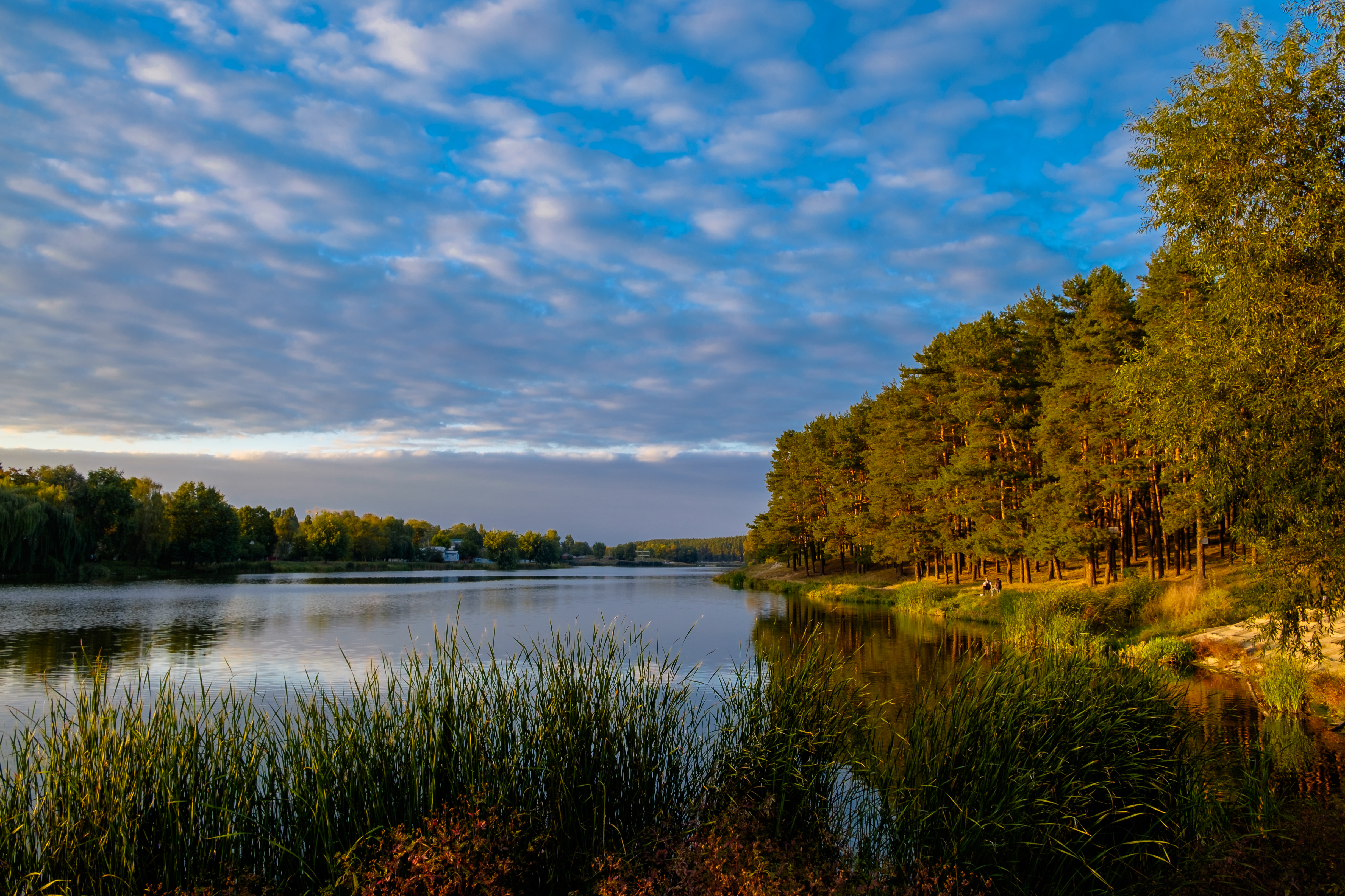 Ялівщина, м. Чернігів, північна околиця